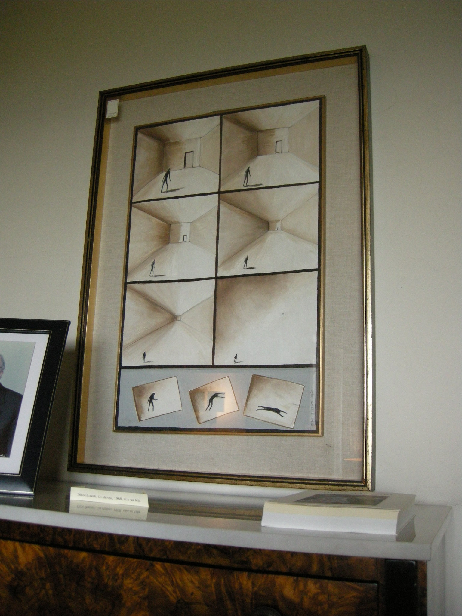 Primo piano, corridoio dino buzzati, la stanza